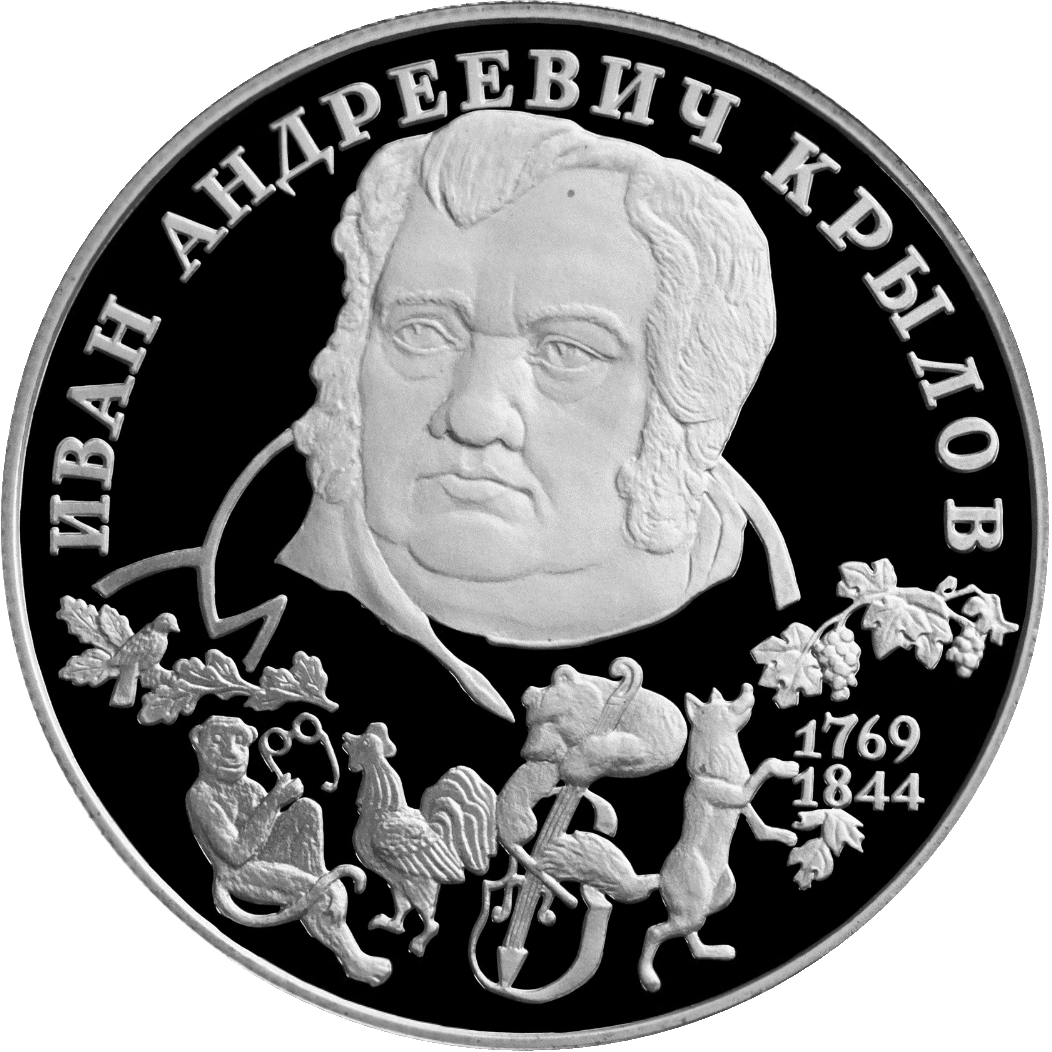 Монета Банка России — Серия: «Выдающиеся личности России», 225-летие со дня рождения И.А. Крылова, 2 рубля, реверс.